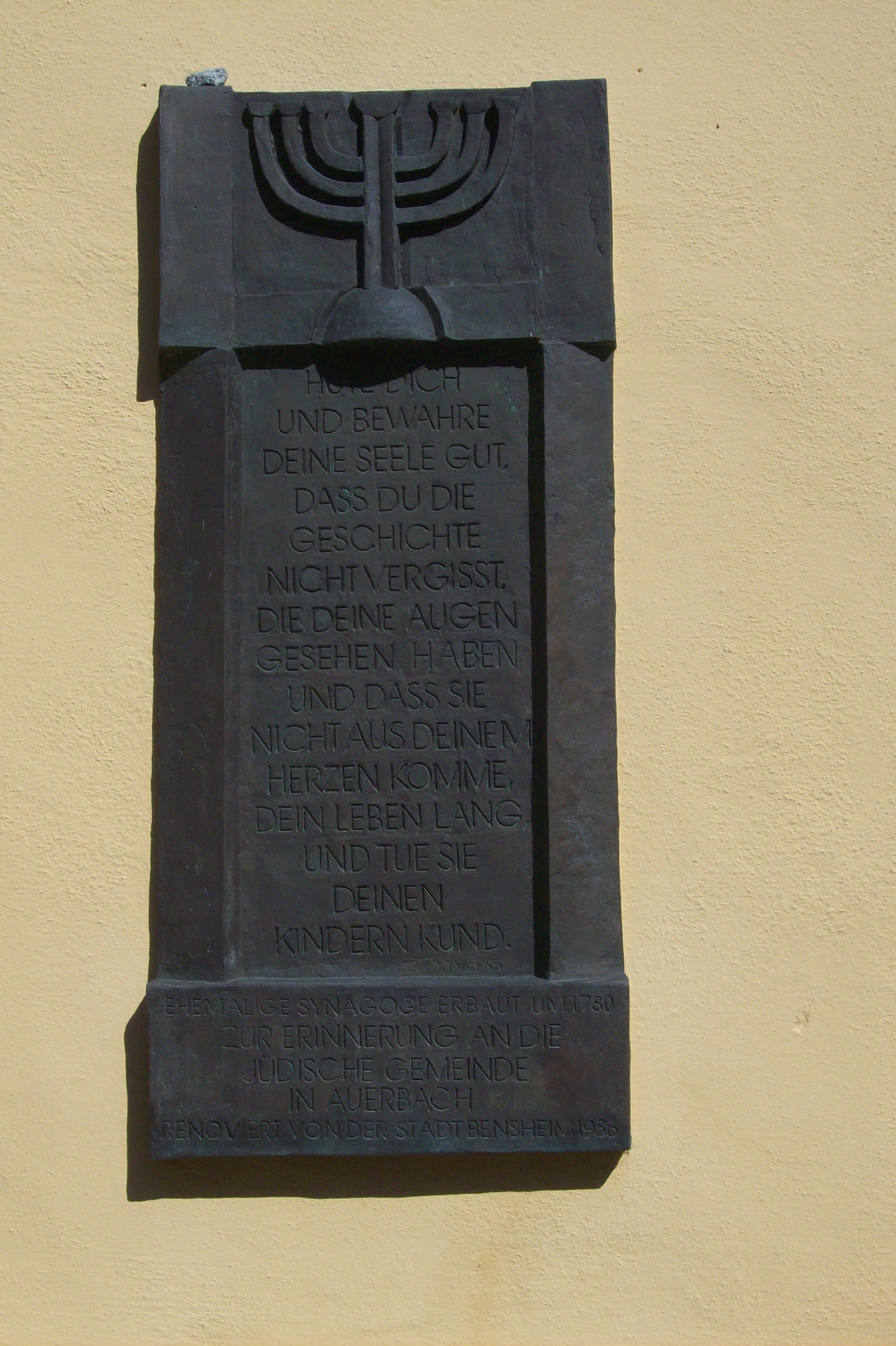 Gedenktafel an der ehemaligen Synagoge von Bensheim-Auerbach, Hessen, Deutschland„Hüte Dich und bewahre deine Seele gut, dass du die Geschichte nicht vergisst, die deine Augen gesehen haben und dass sie nicht aus deinem Herzen komme dein Leben lang und tue sie deinen Kindern kund. 5. Mose. Ehemalige Synagoge erbaut um 1780. Zur Erinnerung an die jüdische Gemeinde in Auerbach. Renoviert von der Stadt Bensheim 1986“.